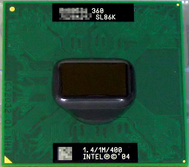 Intel Celeron_M 360J, 1.4 GHz, 1 MB L2-Cache, FSB400, Dothan-Kern, C-0 Stepping, CPUID 06D8h, µFCPGA-Verpackung